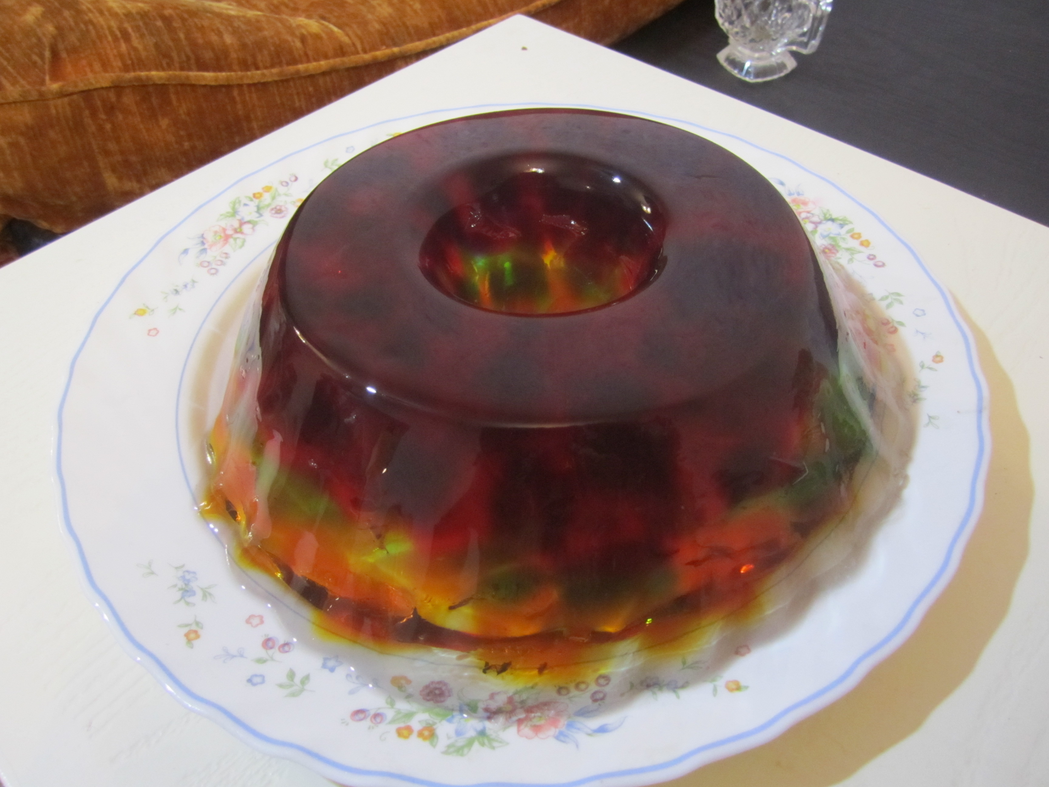 Gelee